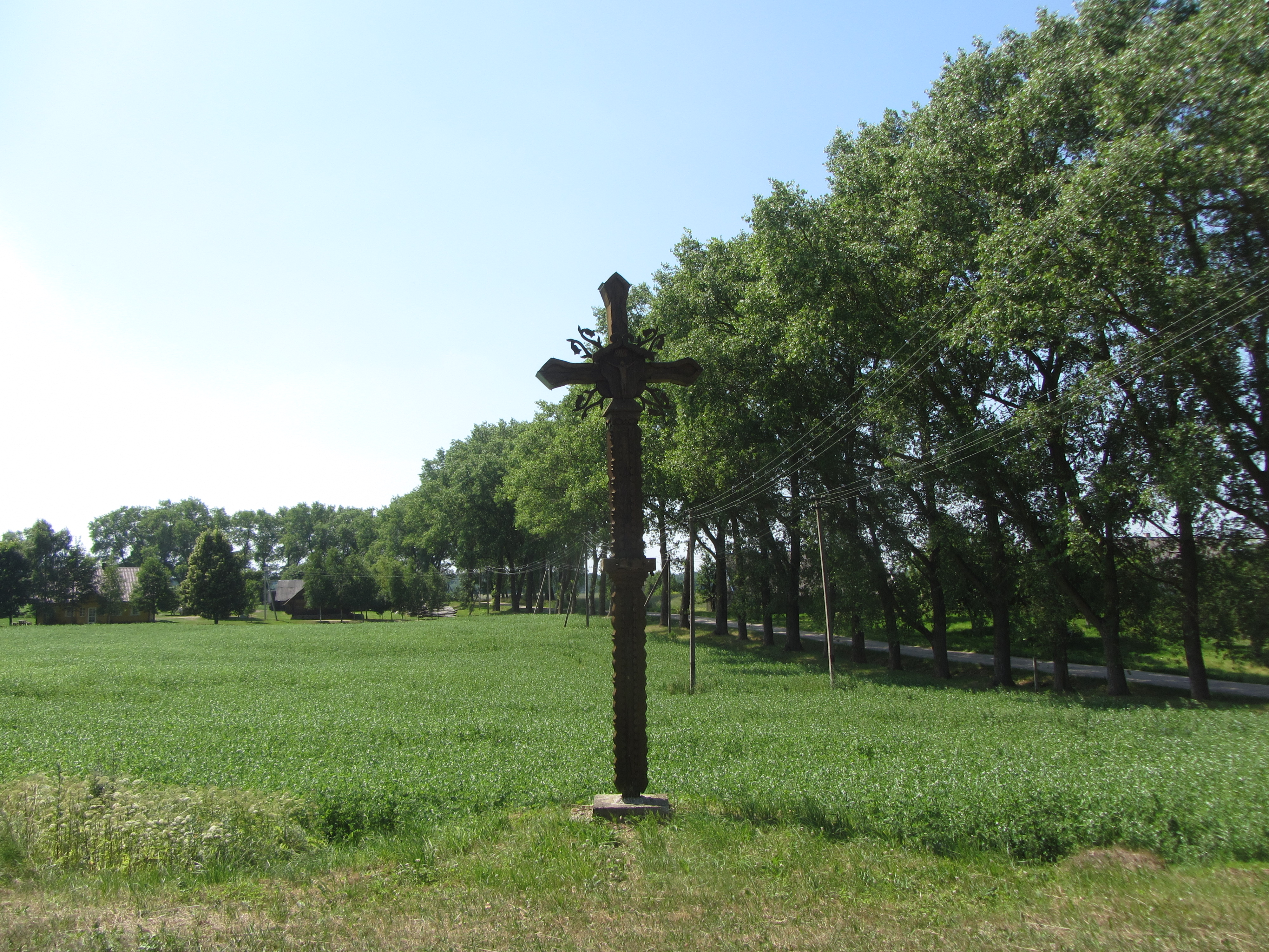 Mišniūnai 20229, Lithuania